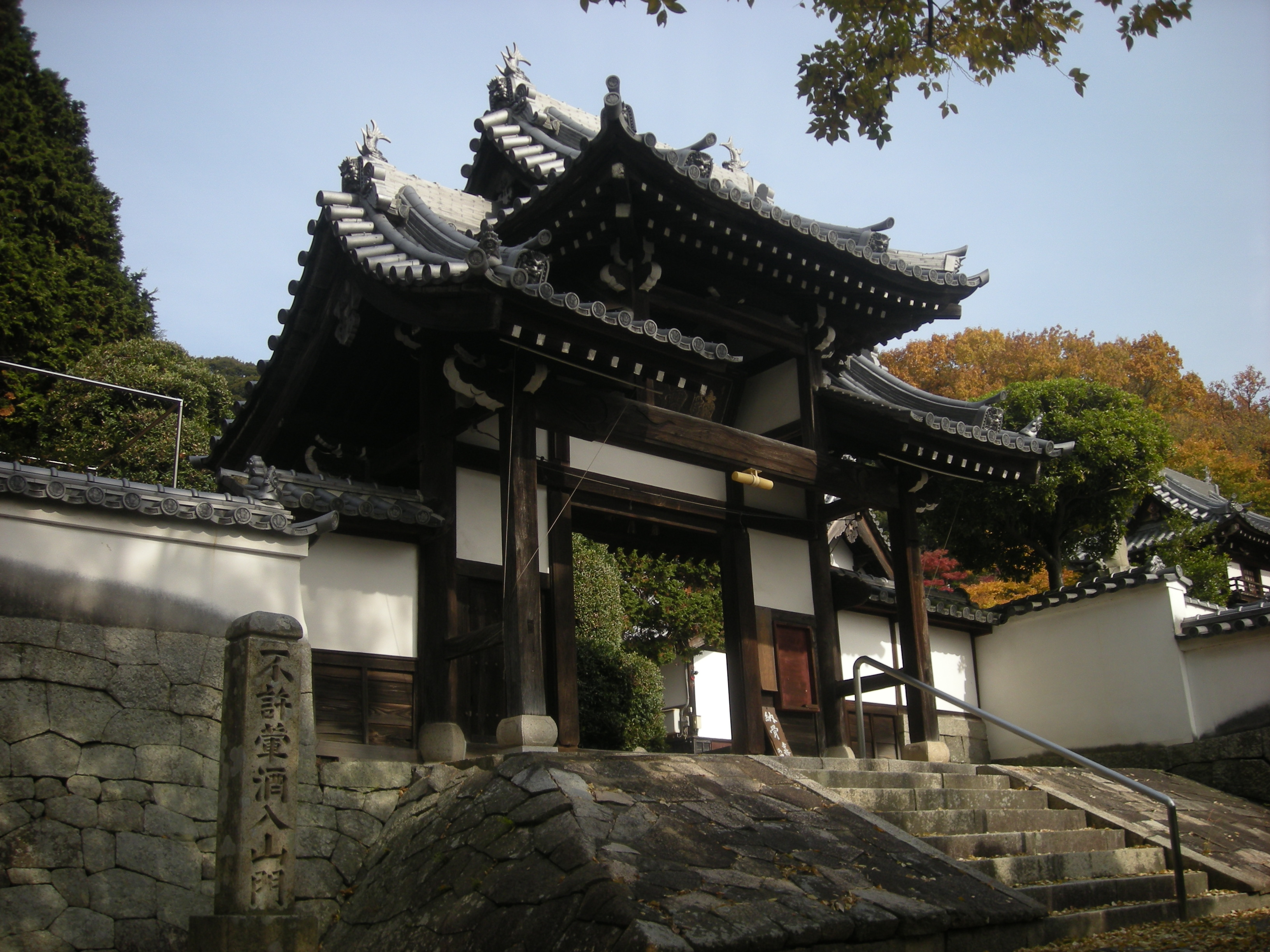 大広寺 山門